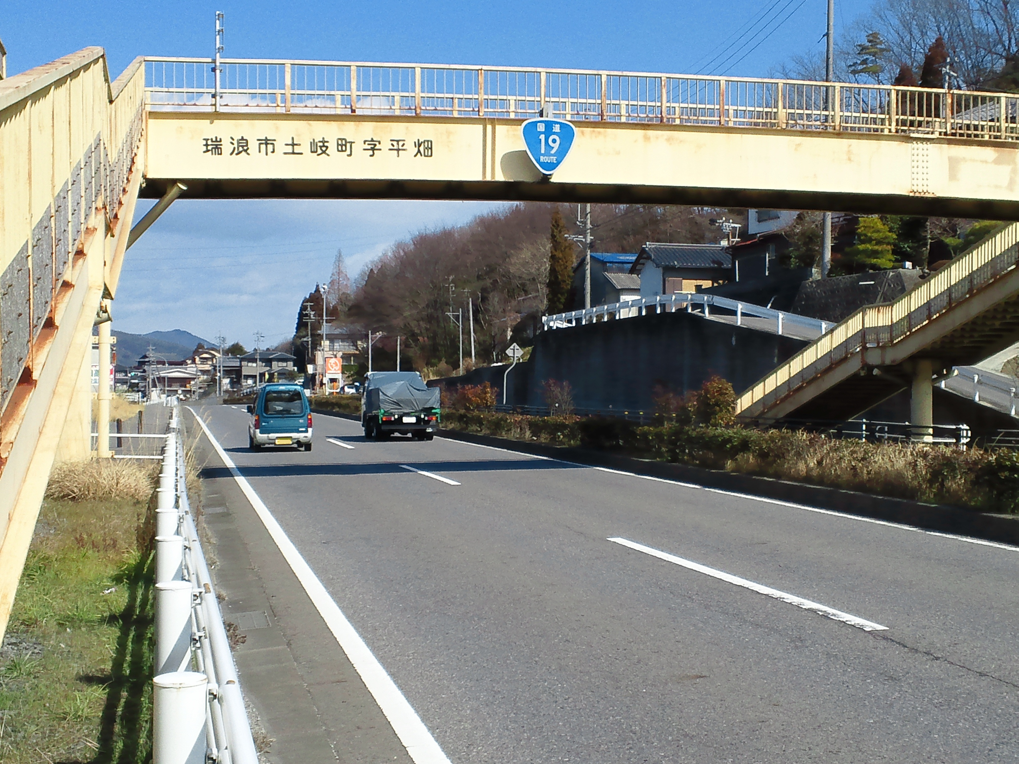 瑞浪市土岐町の国道19号瑞浪バイパス。